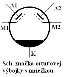 Ortuťová výbojka s mriežkou.